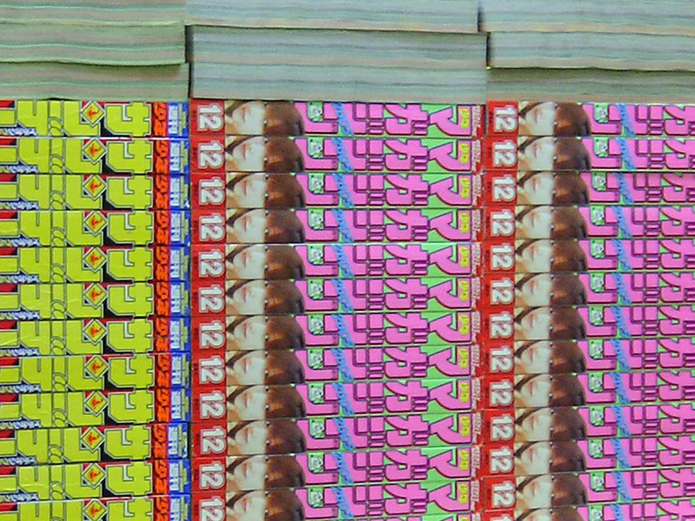 Shibuya station, Tokyo